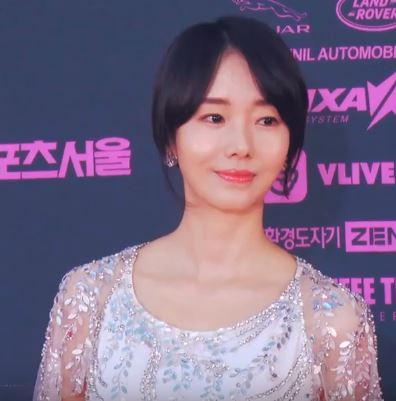 디스패치 구독 클릭